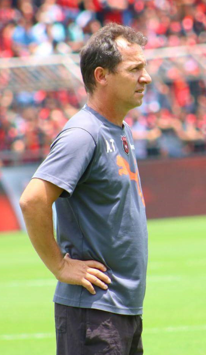 06-08-2017. Wilmer López como el segundo entrenador de Alajuelense previo a un partido contra el Santos de Guápiles.